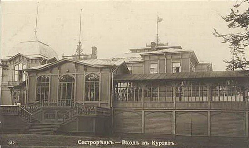 Сестрорецкий курзал